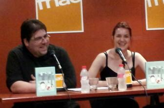 Presentació d'Ana Olcina a l'FNAC.